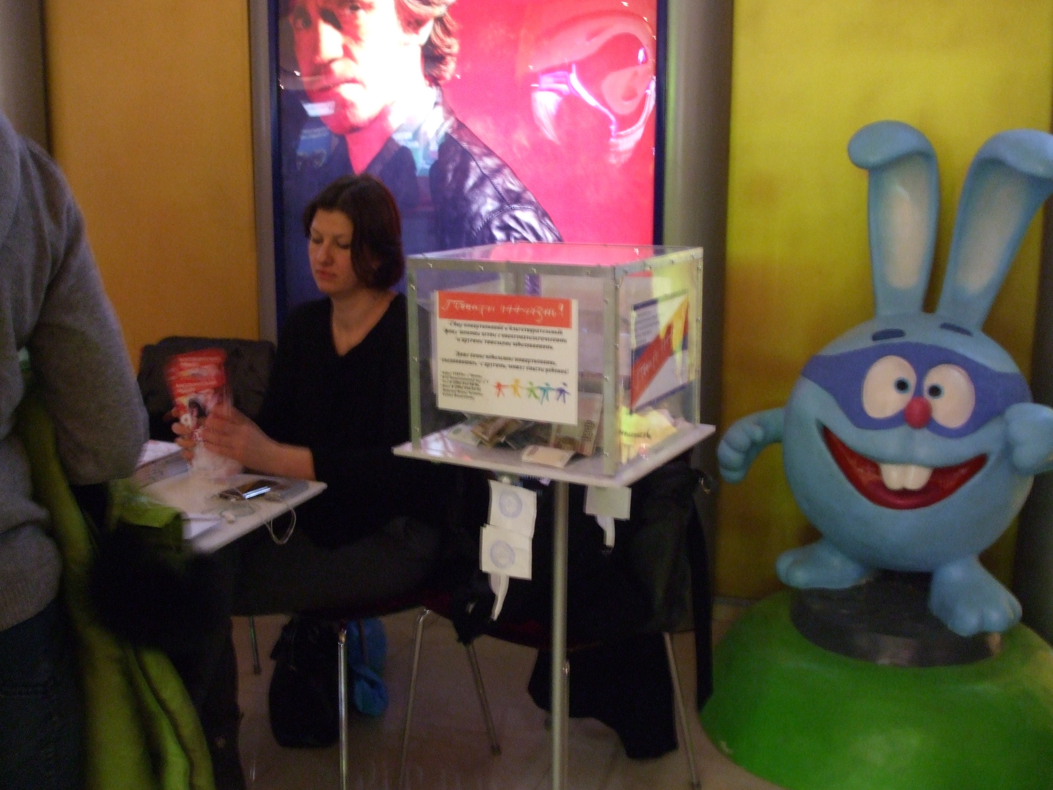 Премьера фильма "Я объявляю войну в России, кинотеатр Октябрь на Новом Арбате"